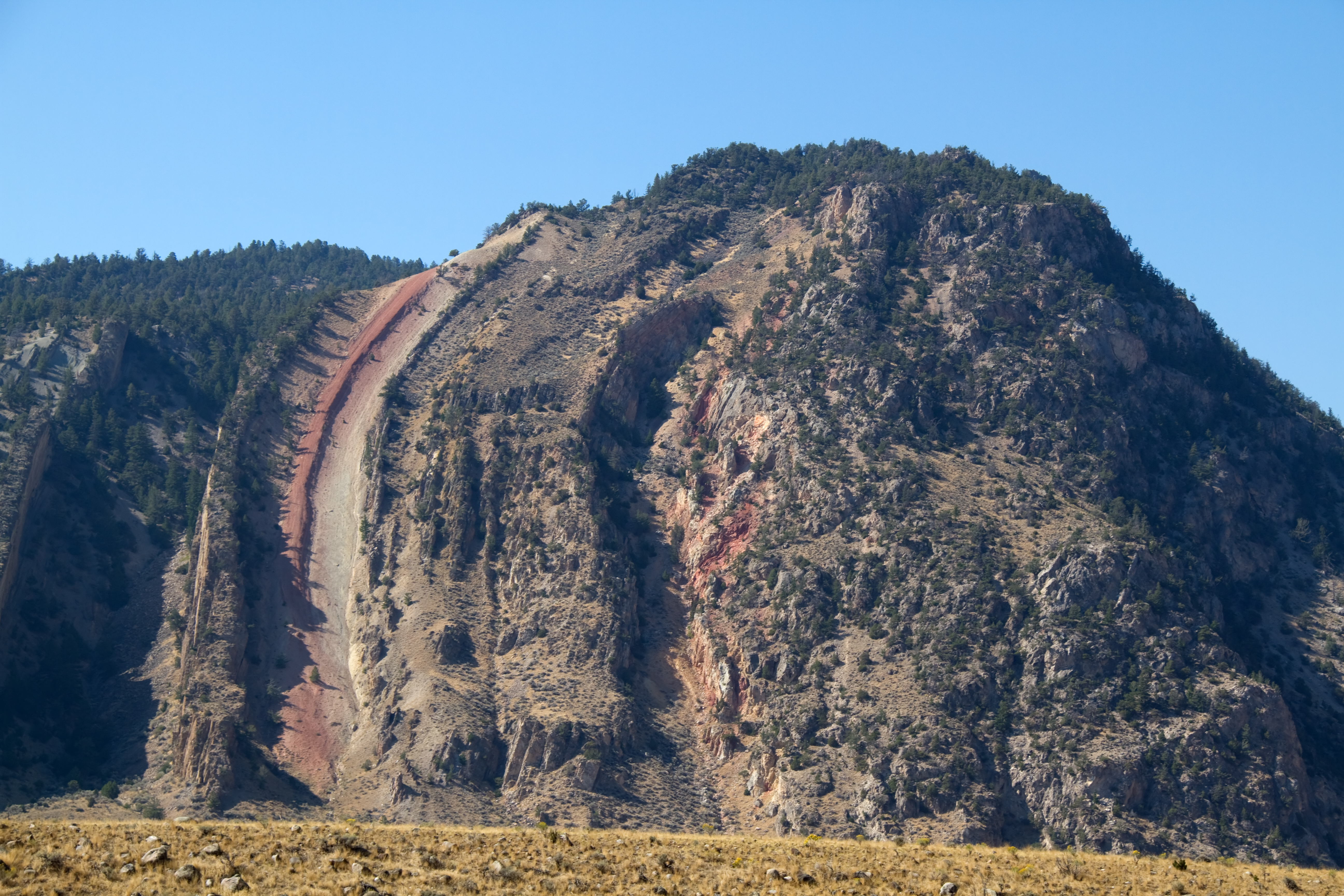 Devil's Slide